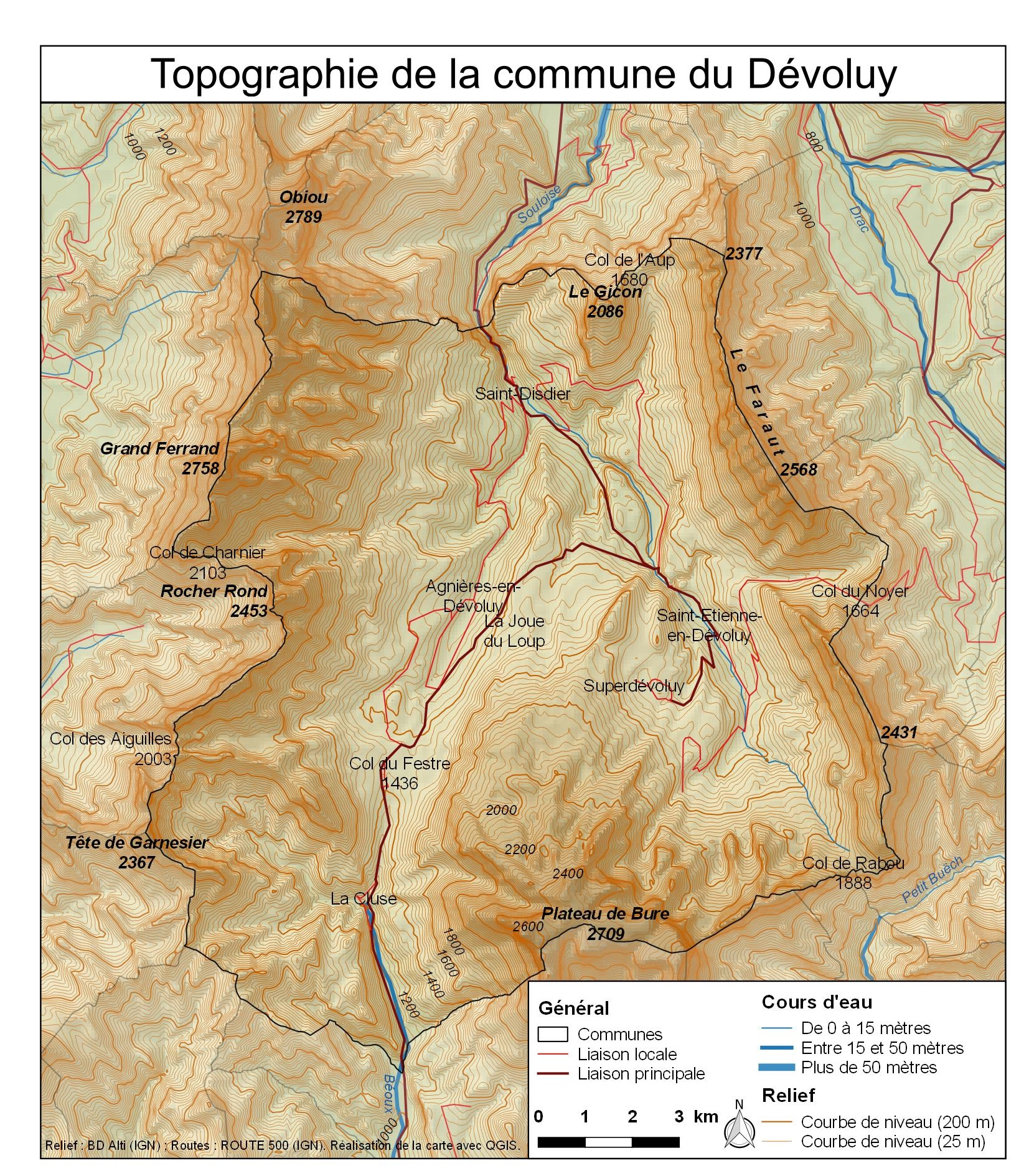 Carte topographique de la commune du Dévoluy